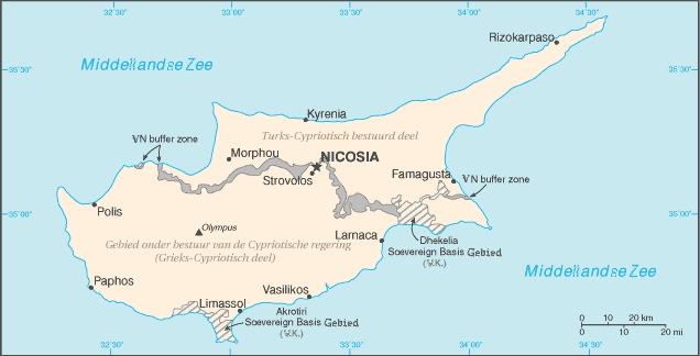 cia-kaart